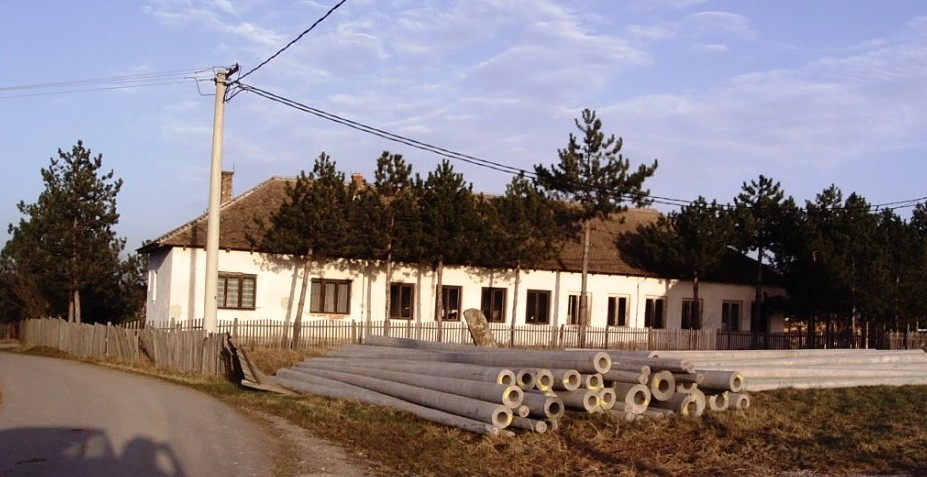 Школа у Руклади.